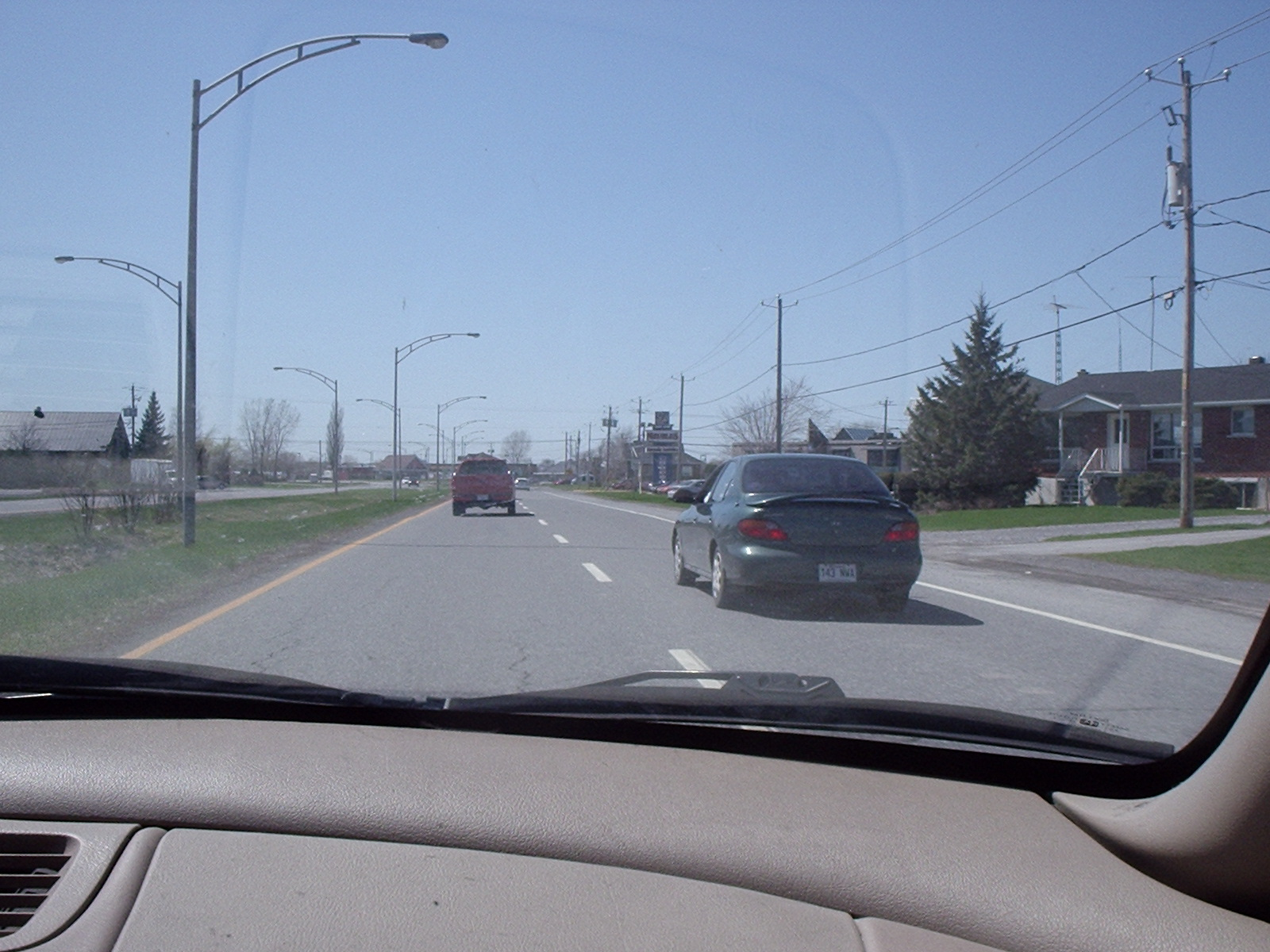 Boulevard Laurier, dans le secteur Sainte-Rosalie de la ville de Saint-Hyacinthe, 28 avril 2006. Photo: Mathieu Demers